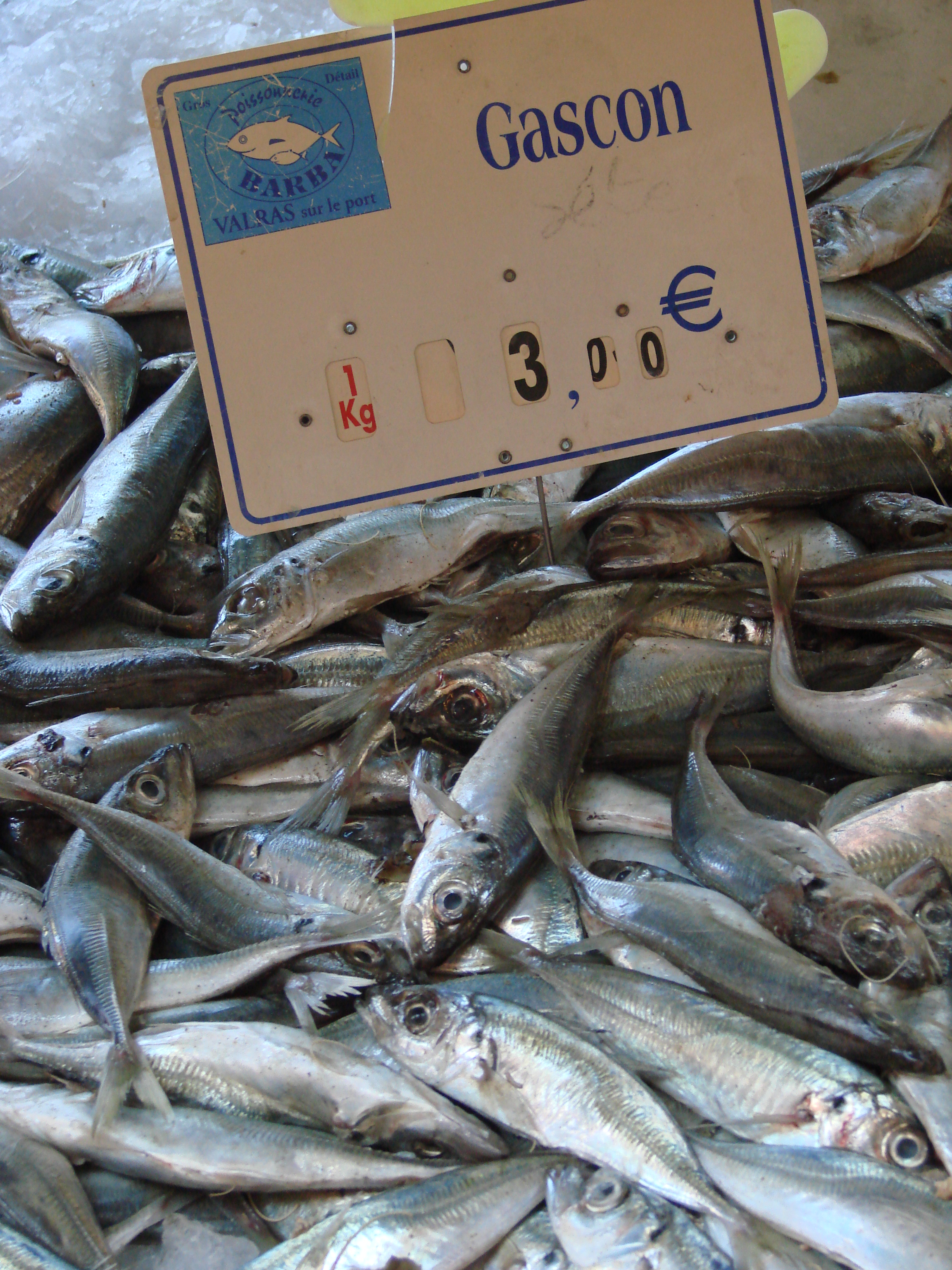 Chinchard de la Méditerranée ( gascons ) à l'étal